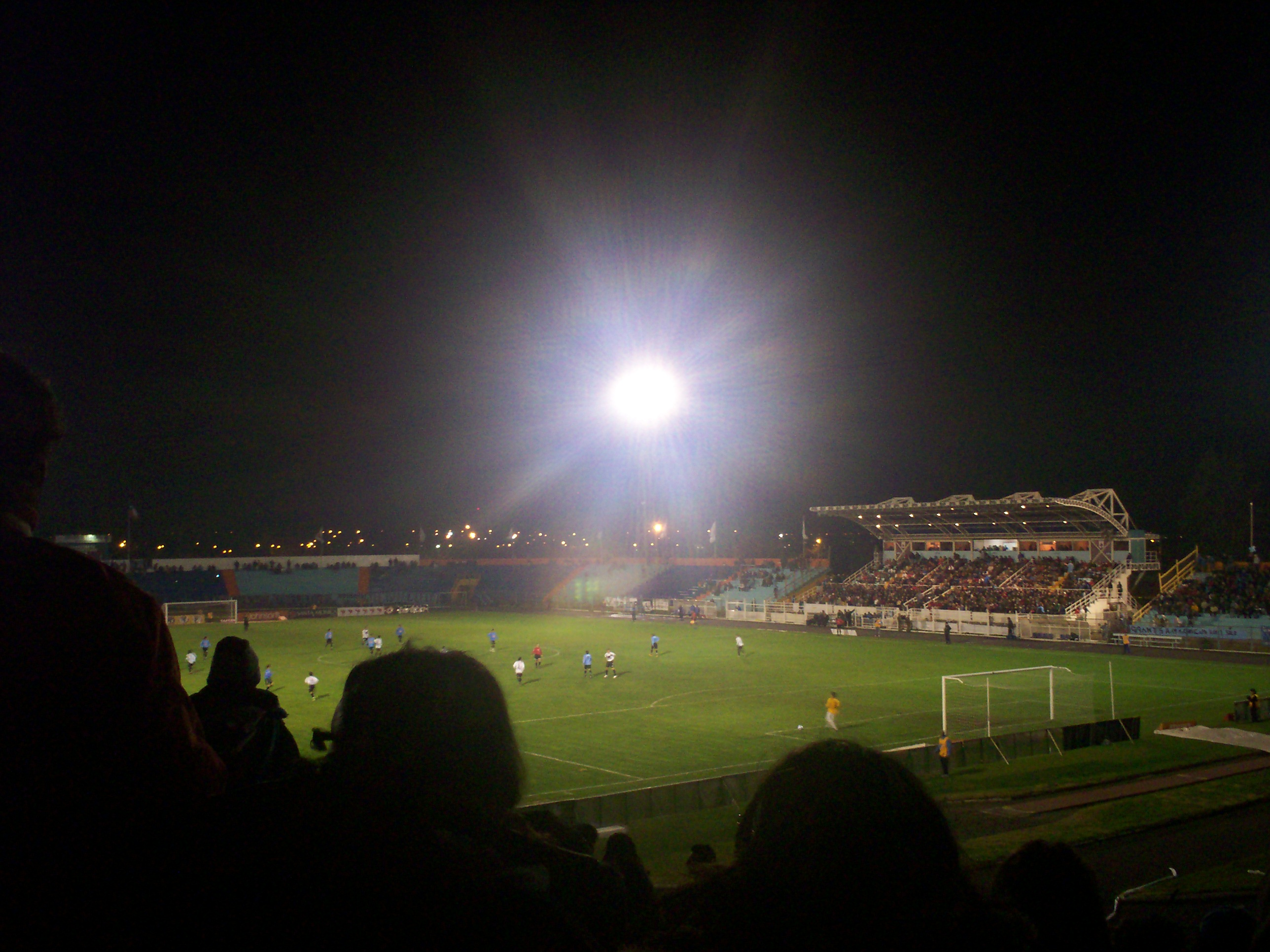 Estadio El Teniente , Rancagua, en partido de O'Higgins contra Colo Colo.